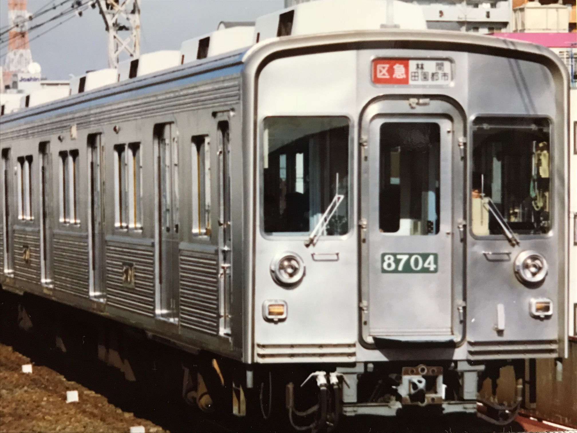 8200系